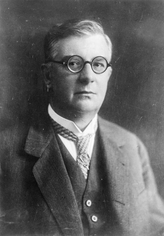 Das neuerrichtete Ordinariat für Chinakunde und Chinaforschung an der Universität Frankfurt a/M. wurde dem Prof. Dr. R. Wilhelm in Frankfurt a/M. übertragen. Prof. Wilhelm geniesst in seinem Fache Weltruf und hat durch seine wissenschaftlichen Arbeiten unschätzbare Pionierarbeit für die deutsch-chinesischen Beziehungen geleitet.